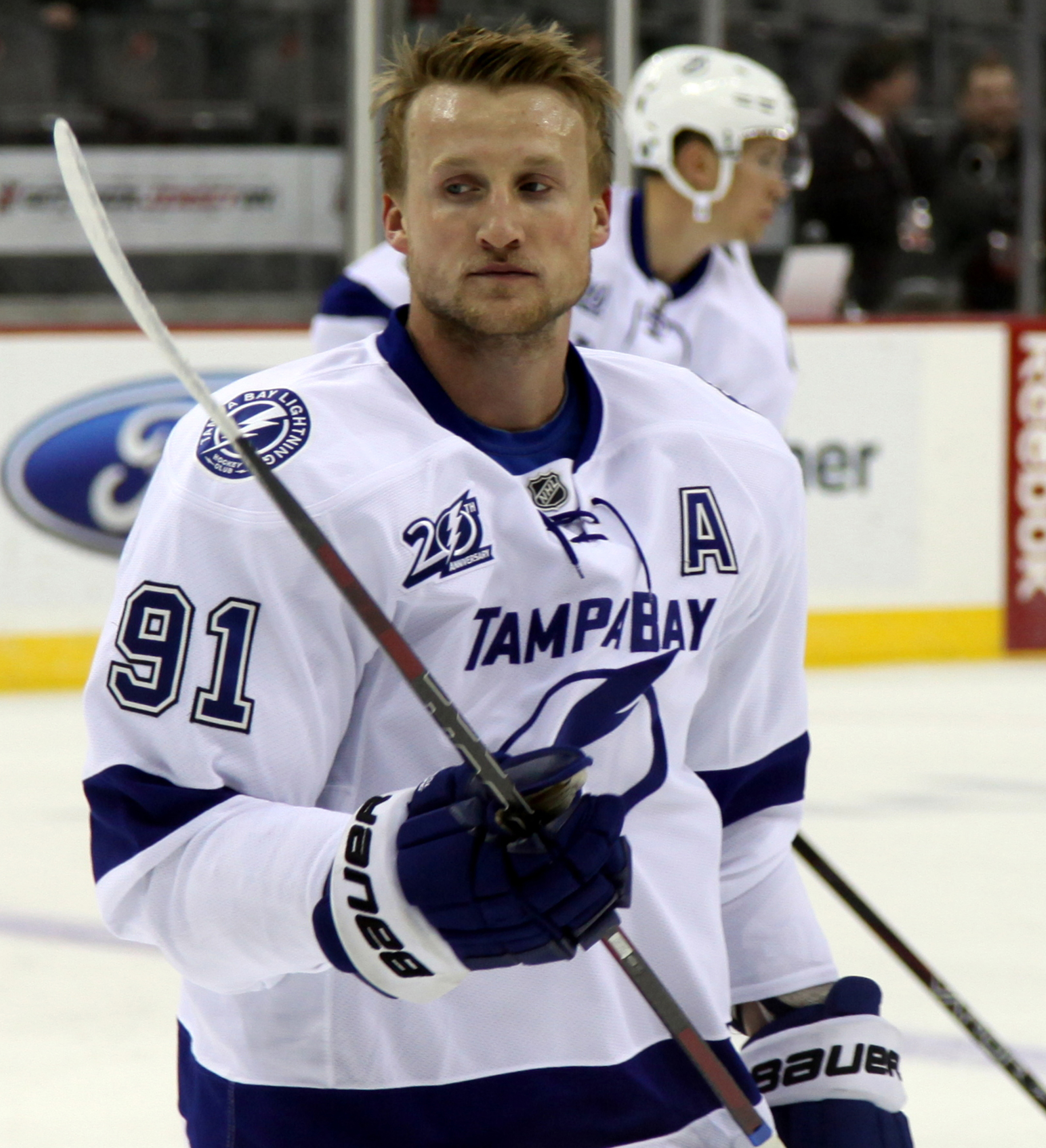 Stamkos in 2013.